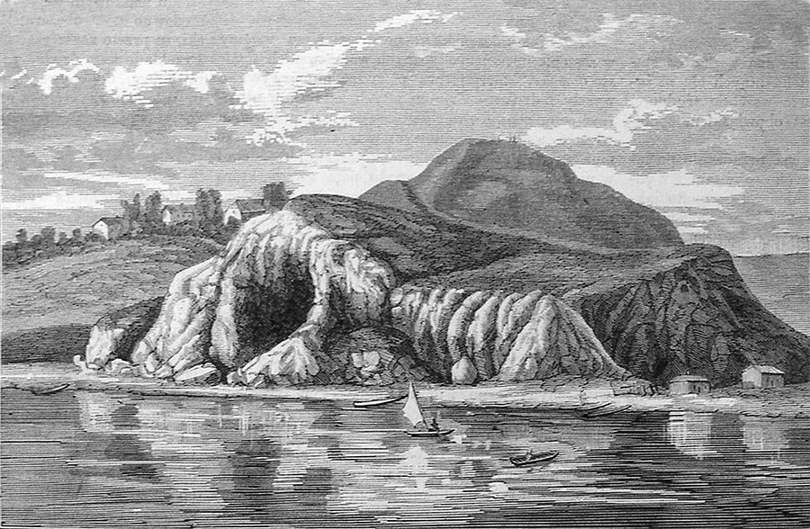 Góra zamkowa w Drohiczynie nad Bugiem w 1872 roku